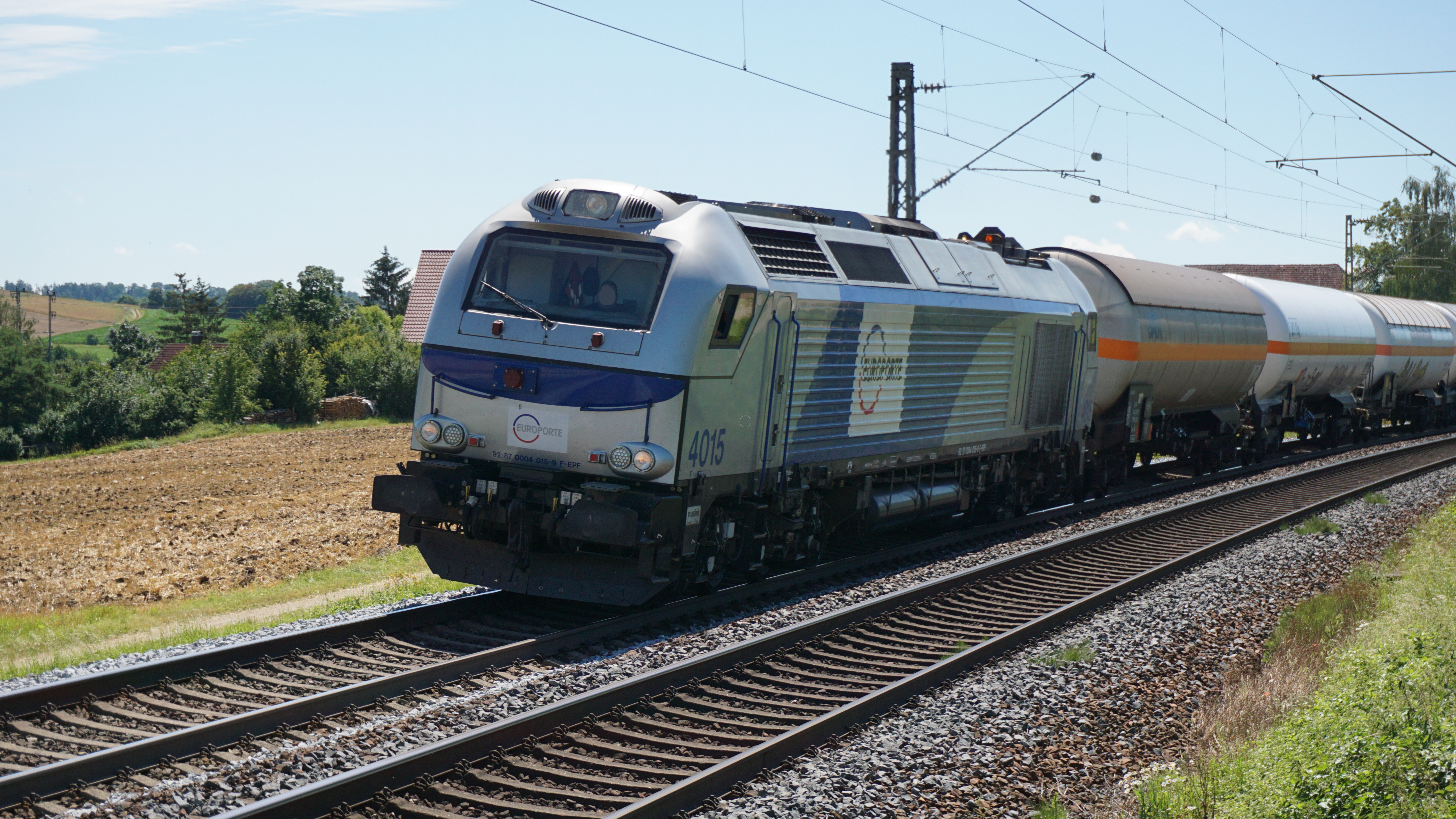 eine Euro 4000 von Europort zieht ihre Kesselwagen durch Treuchtlingen Richtung Würzburg